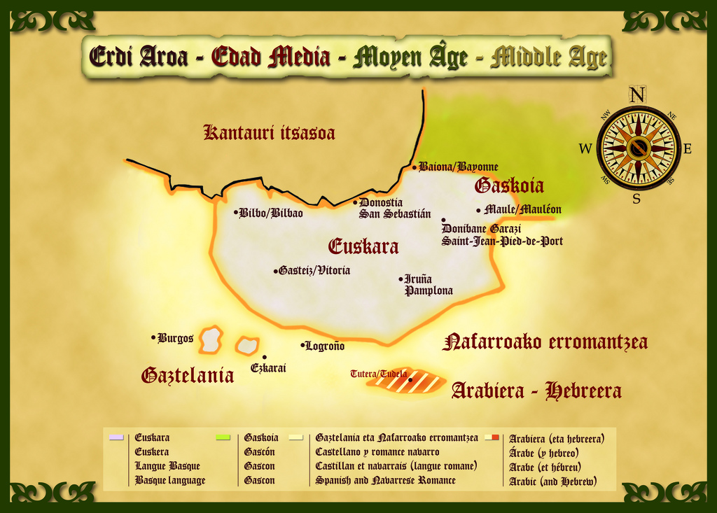 Euskara Erdi Aroan.